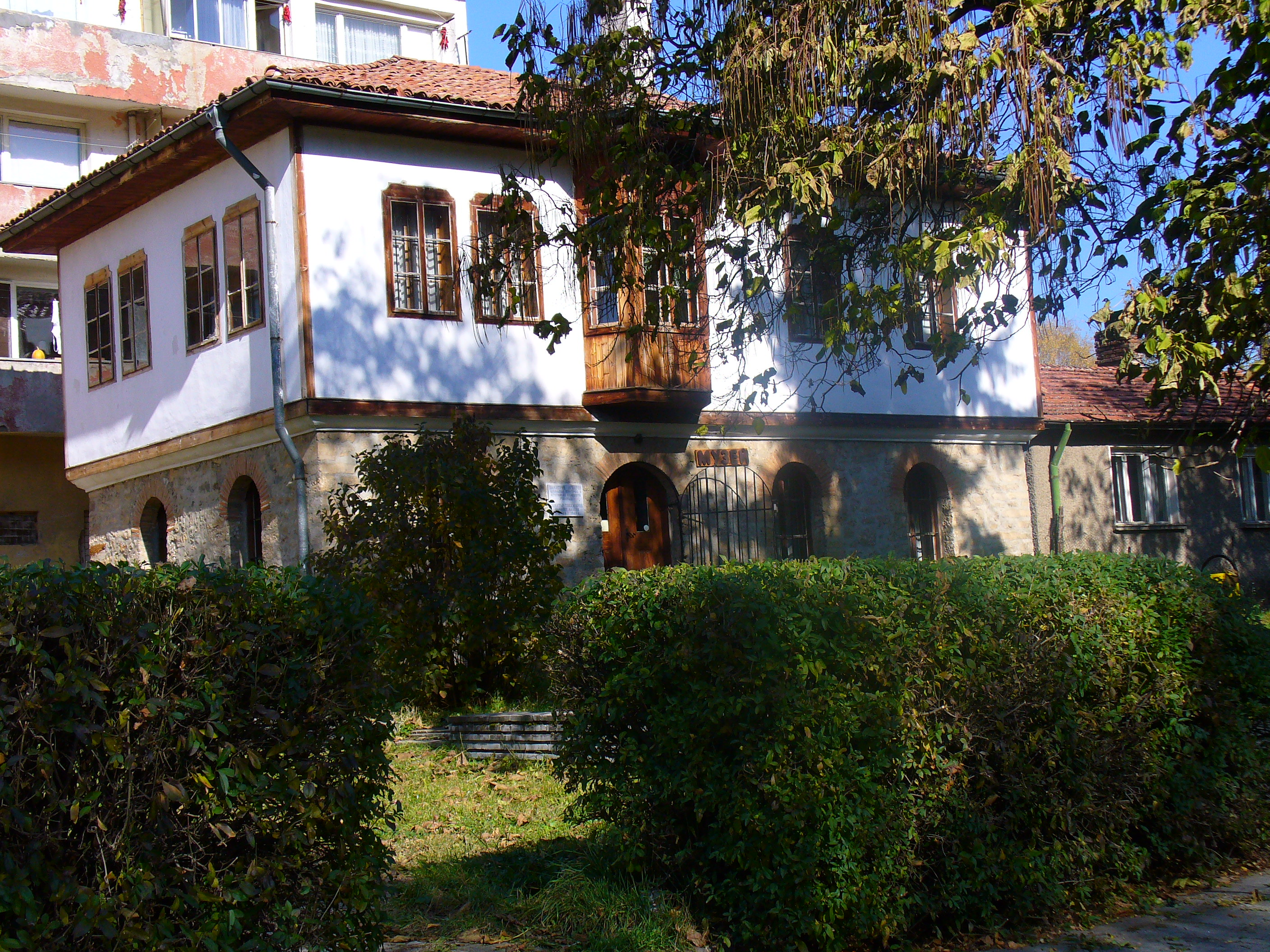 Снимка на градският музей в Брезник.